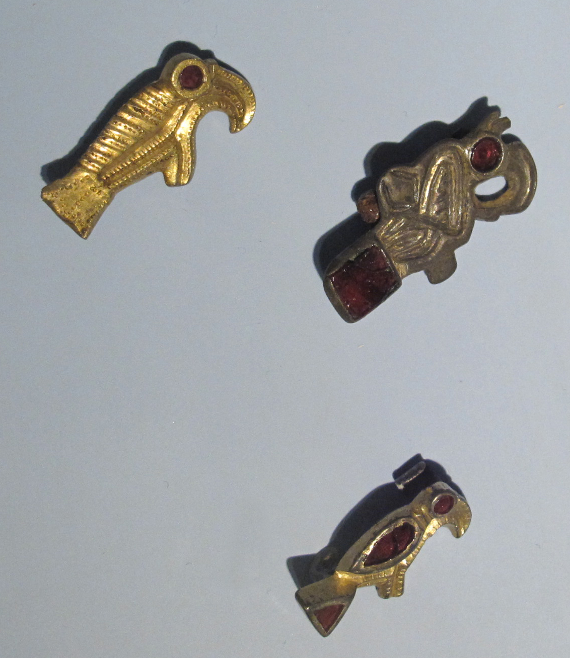 Fibule a forma d'uccello, da rheinland-pfalz, alto medioevo